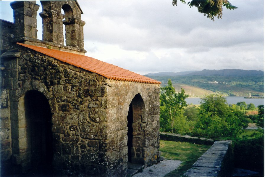 Exterior da igrexa de Santa Comba de Bande